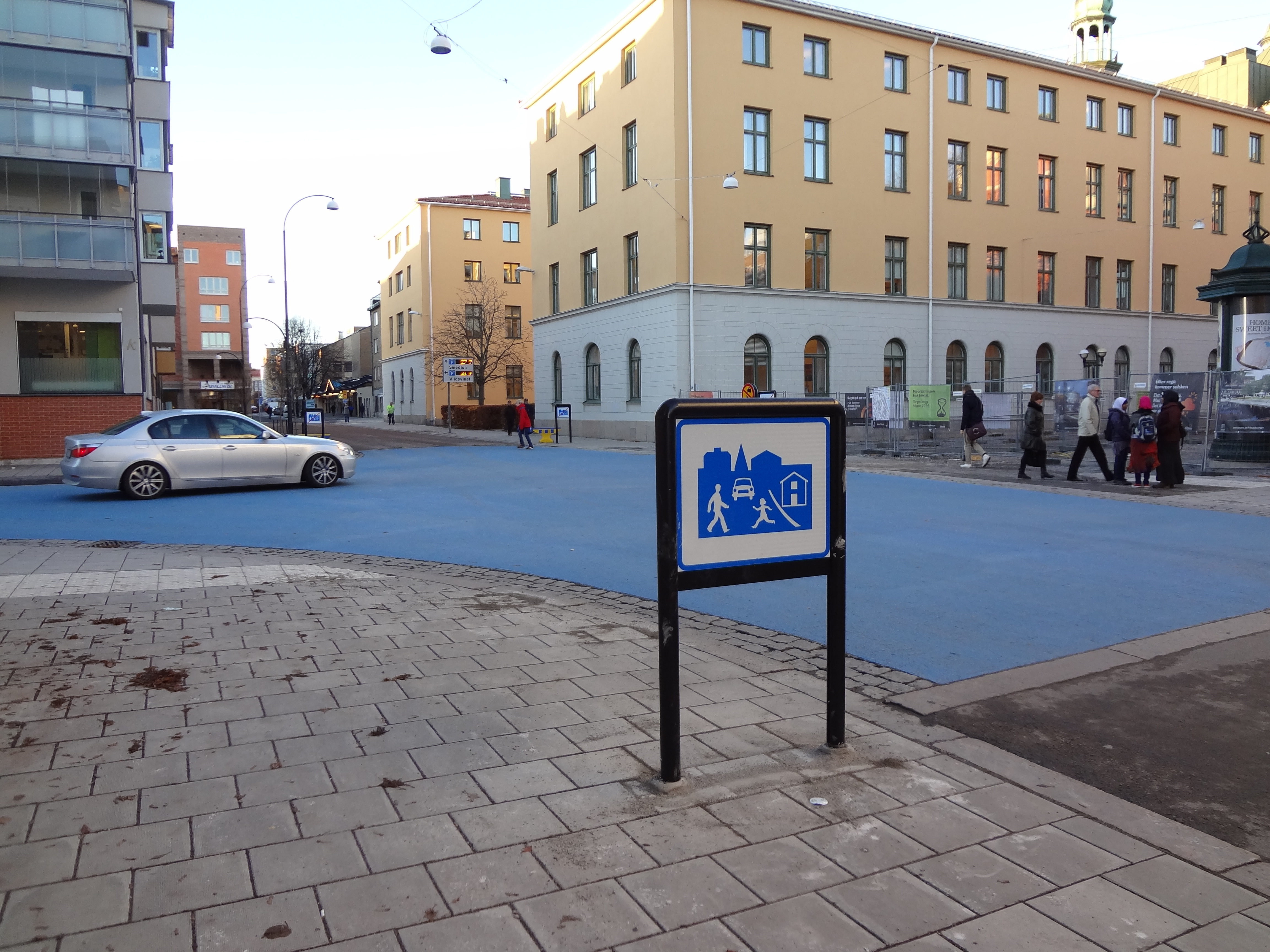 Ett gångfartsområde i korsningen Nygatan/Gymnastikgatan i centrala Eskilstuna.